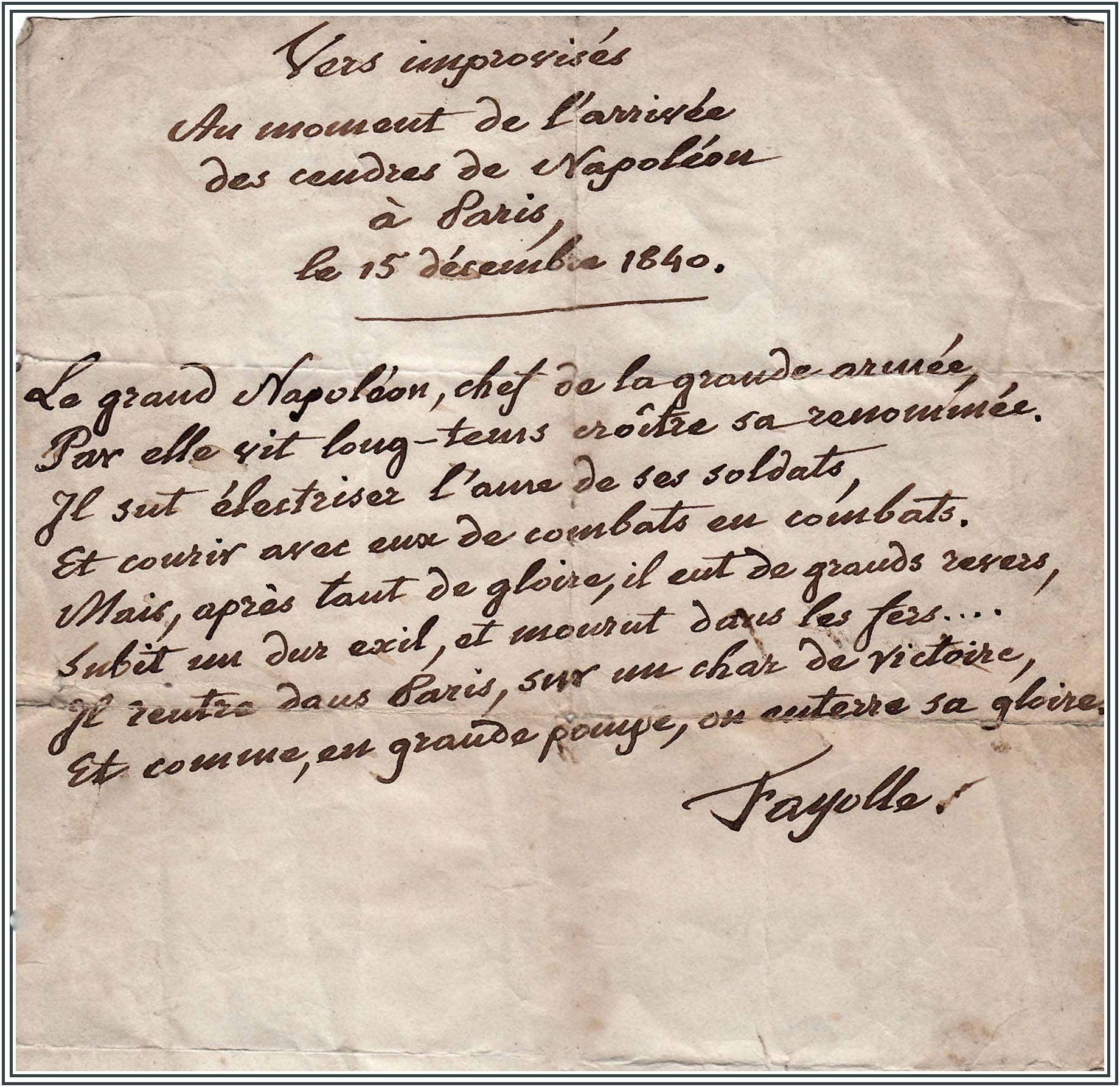 Fayolle, poeme sur le retour des cendres de Napoleon, 1840.